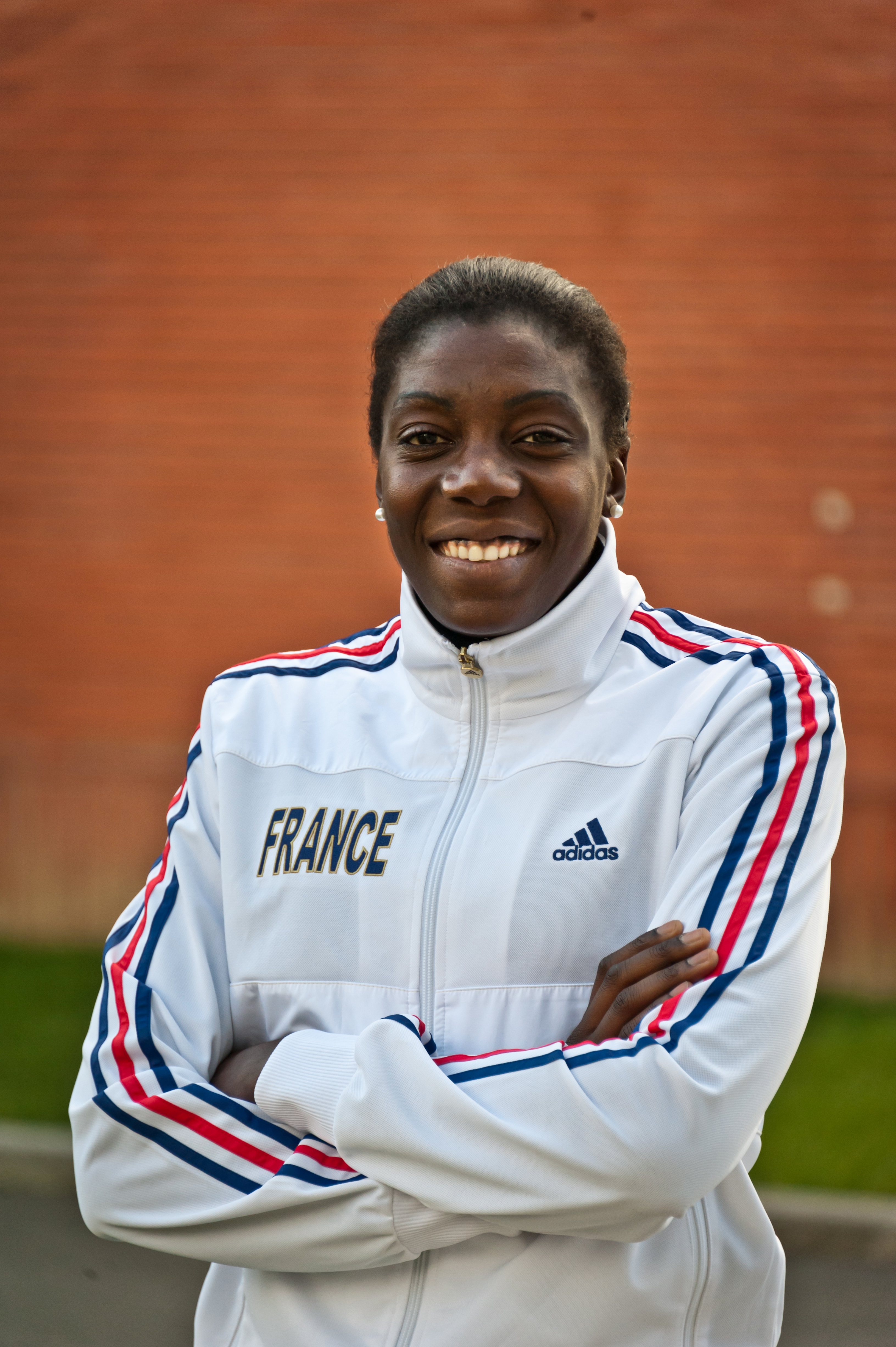 Championne du Monde de Taekwondo